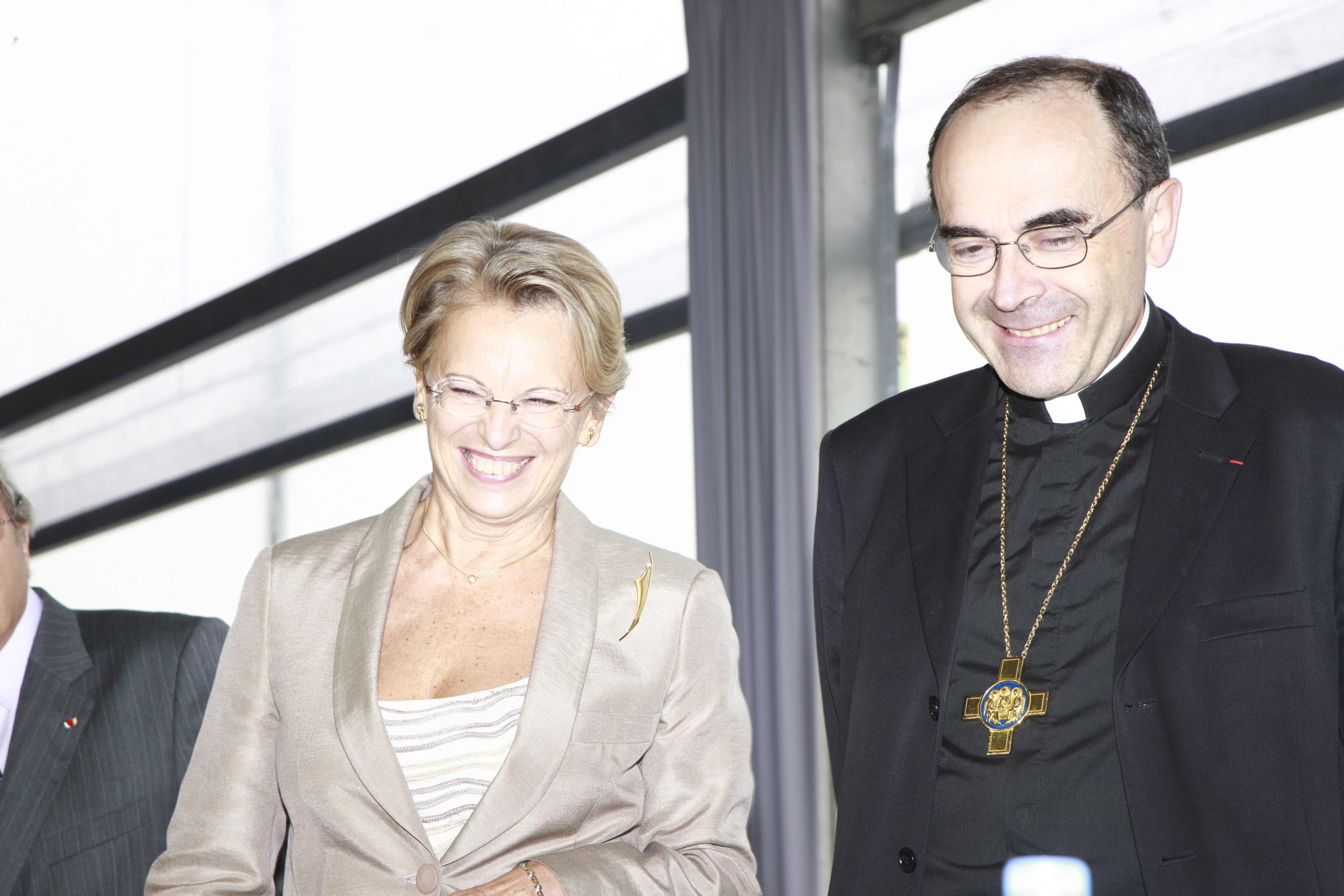 Michèle Alliot-Marie et Monseigneur Barbarin en août 2008.